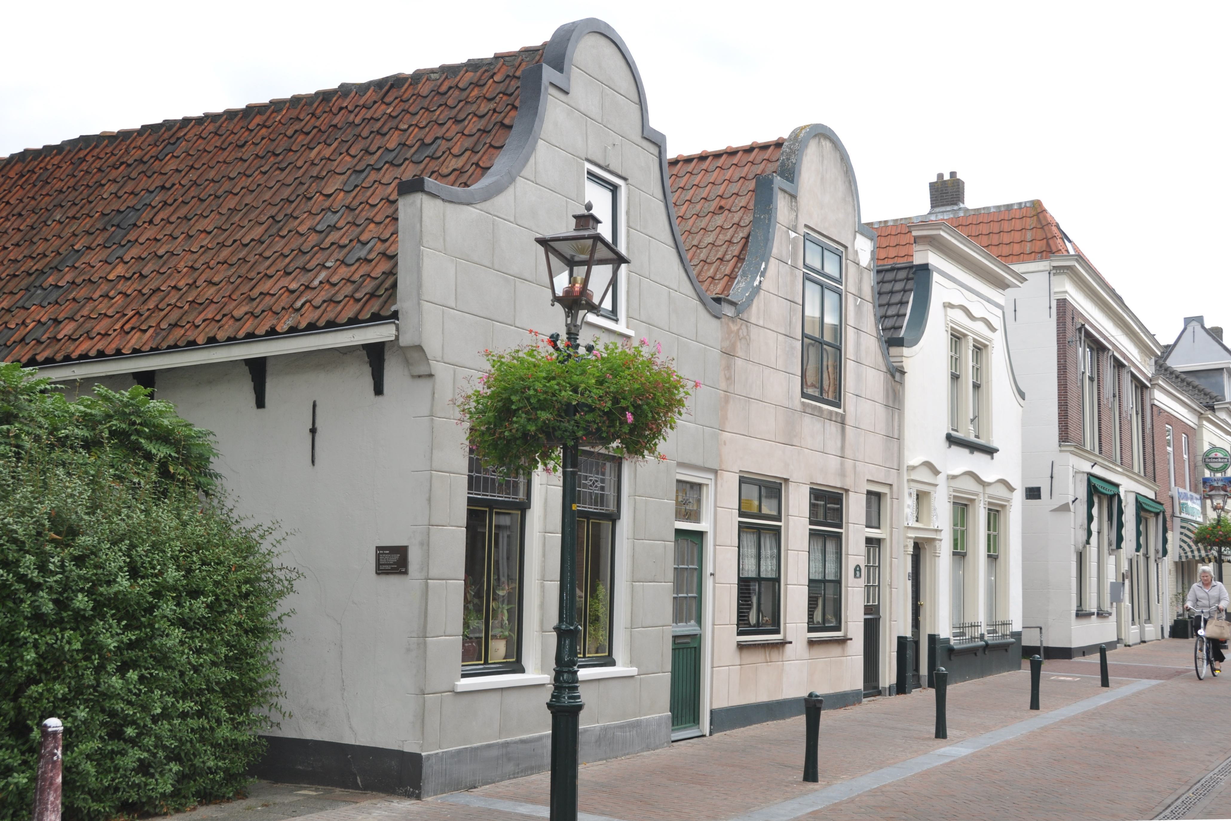 Gebouwen in Zoetermeer.